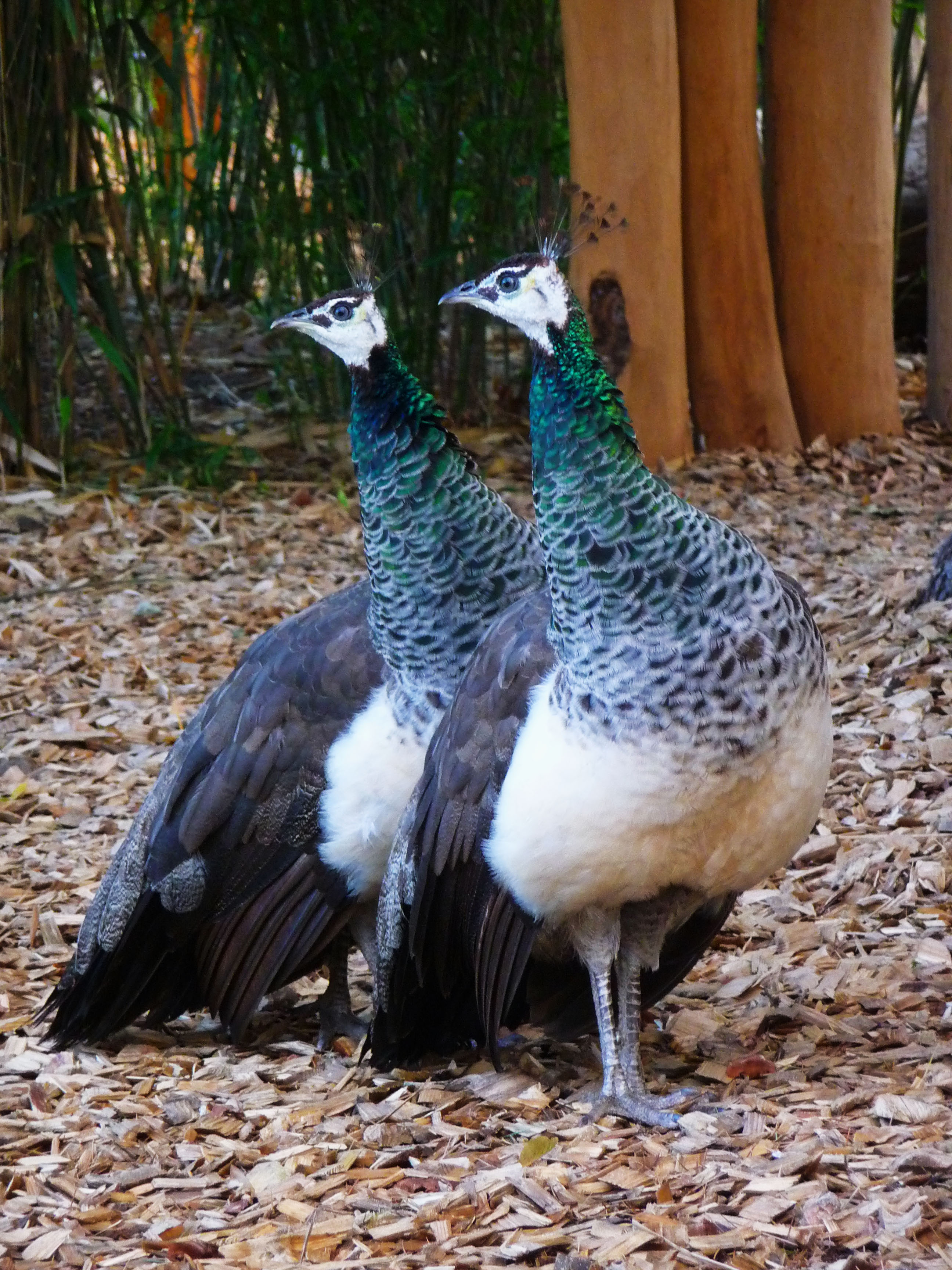 Zwei blaue Pfauenhennen (Pavo cristatus)